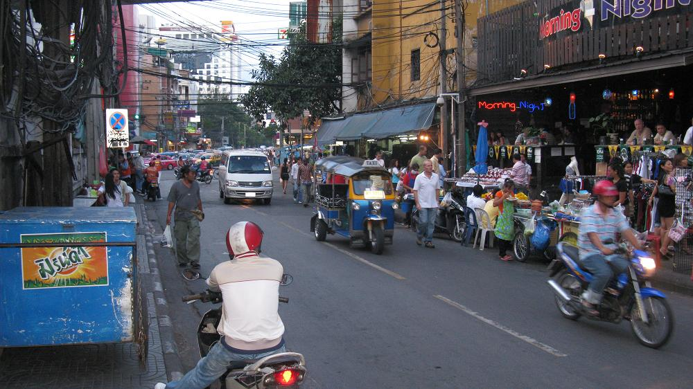 Nana, Bangkok